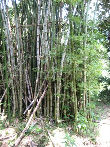 Bosque de bambu en el Caribe